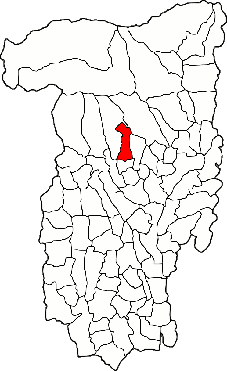 Lage der Gemeinde Bărbătești im Kreis Vâlcea (RO).